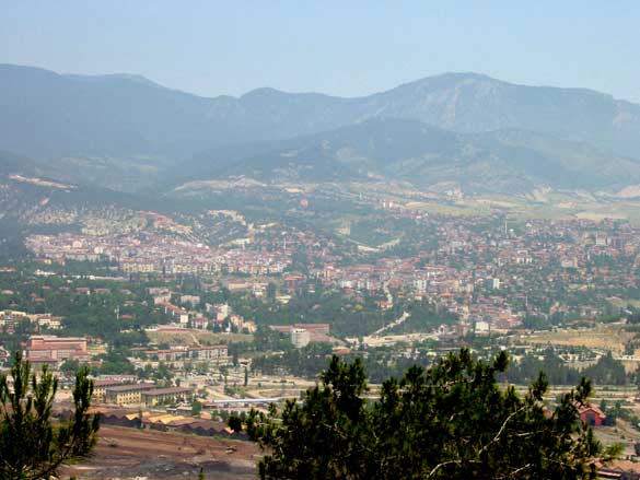 karabük'ün genelini gösteren bir fotoğraf